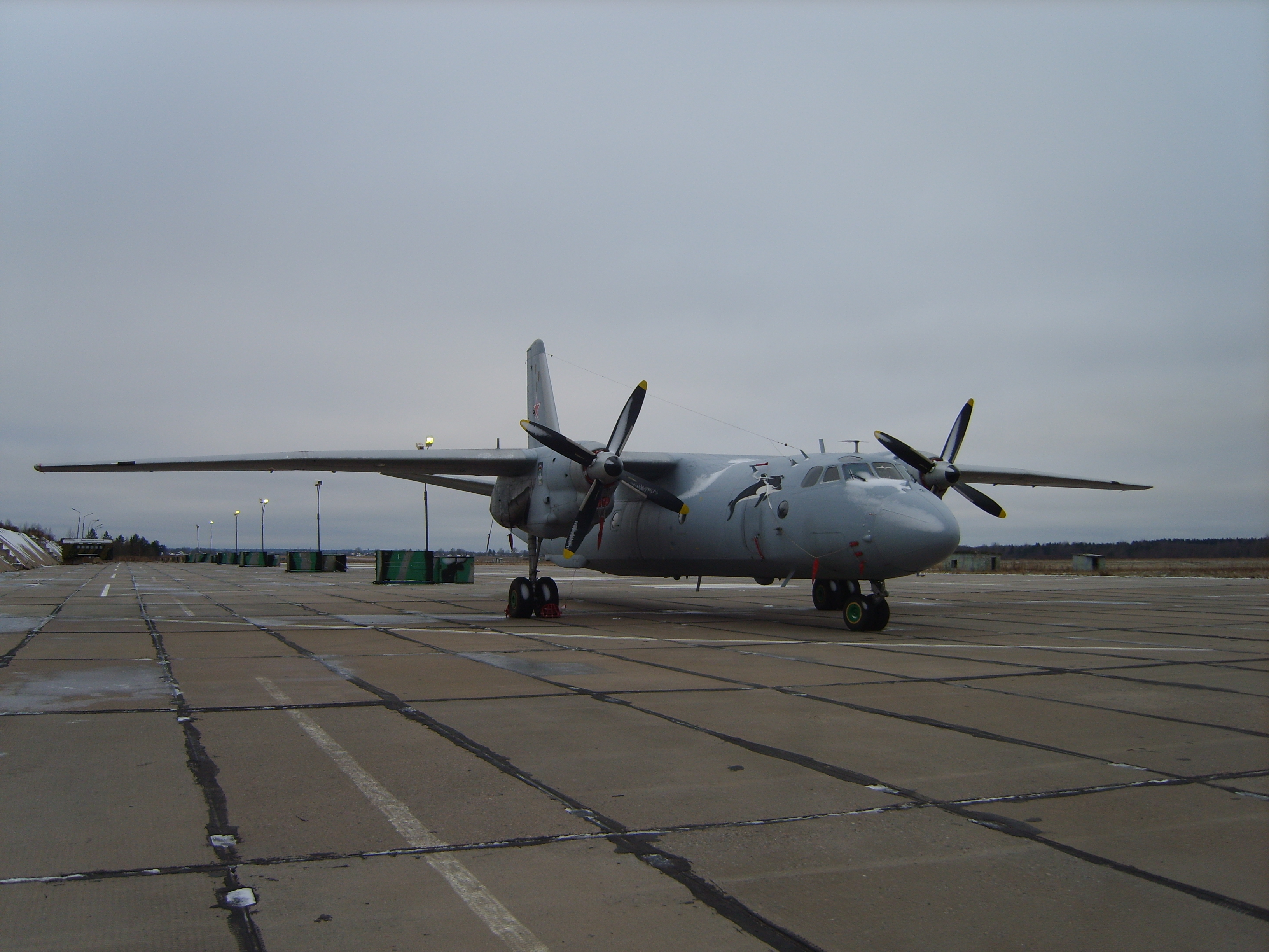 Ан-26 авиации Черноморского флота на ТППС аэродрома Сиверский